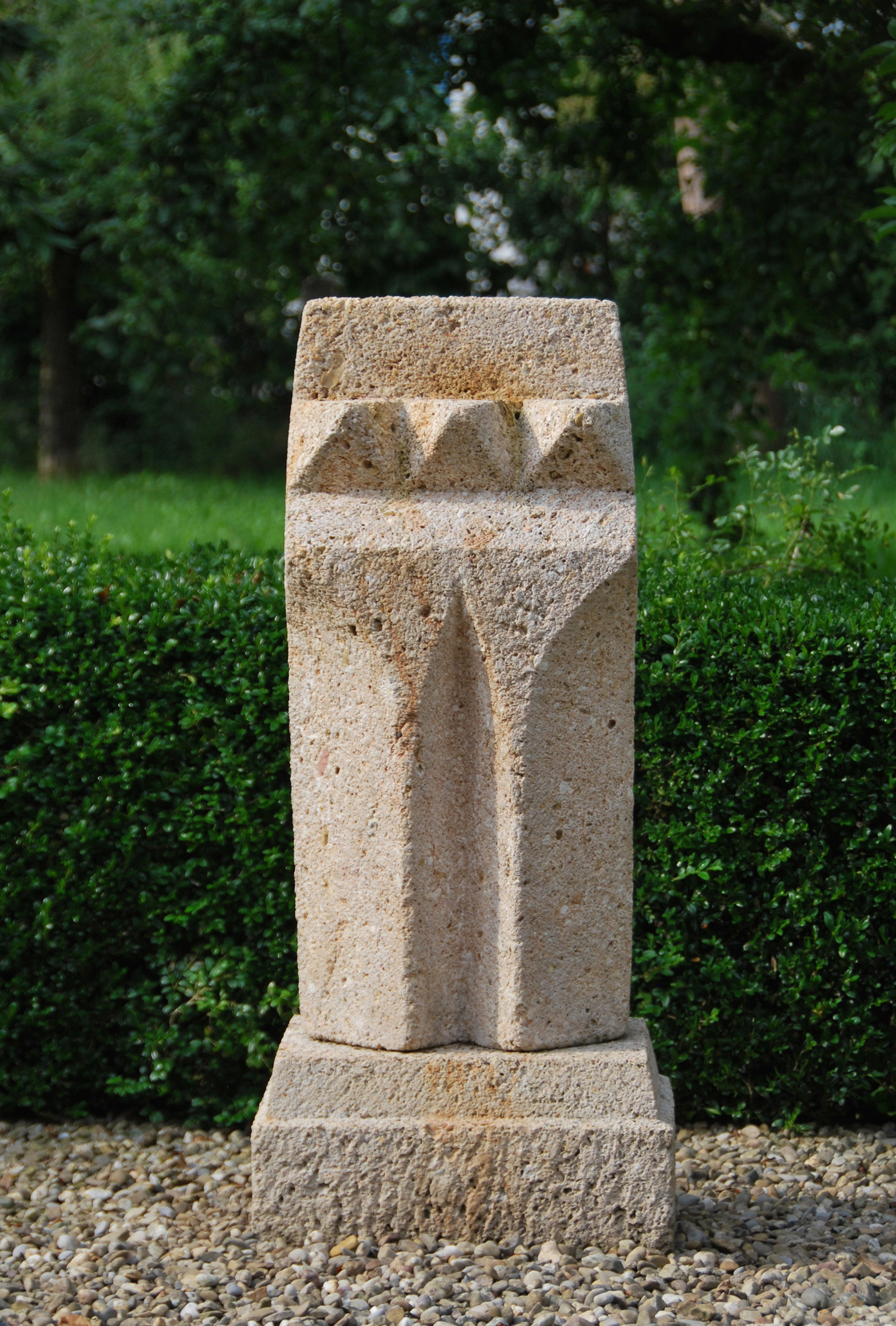 Walter Gürtler: Gotischer Mann, Muschelkalk, 1958, im Besitz von Jeanne Schneeberger